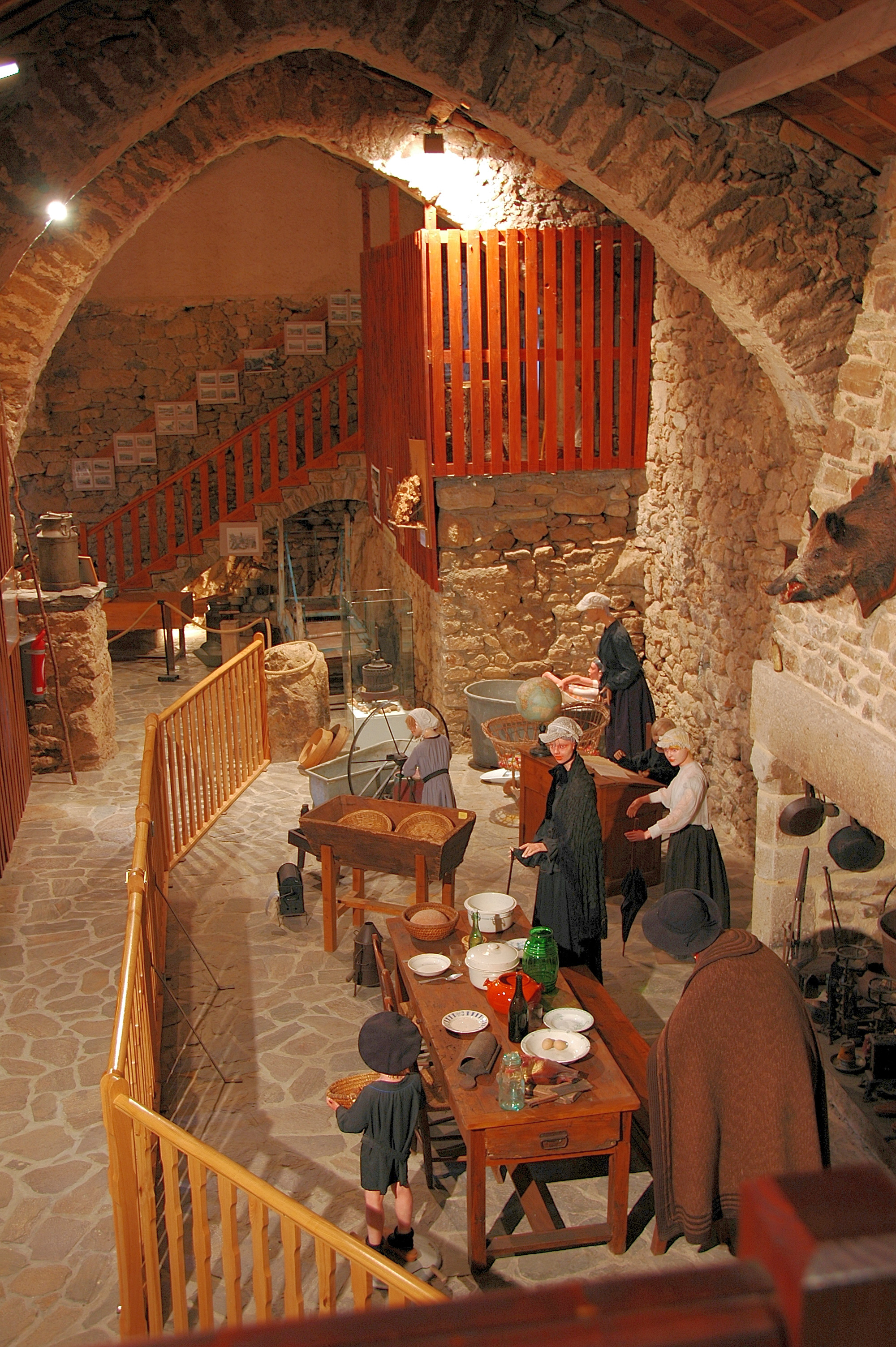 Nages (Tarn) - salle du musée de la vie paysanne en Haut-Languedoc - Rieumontagné.